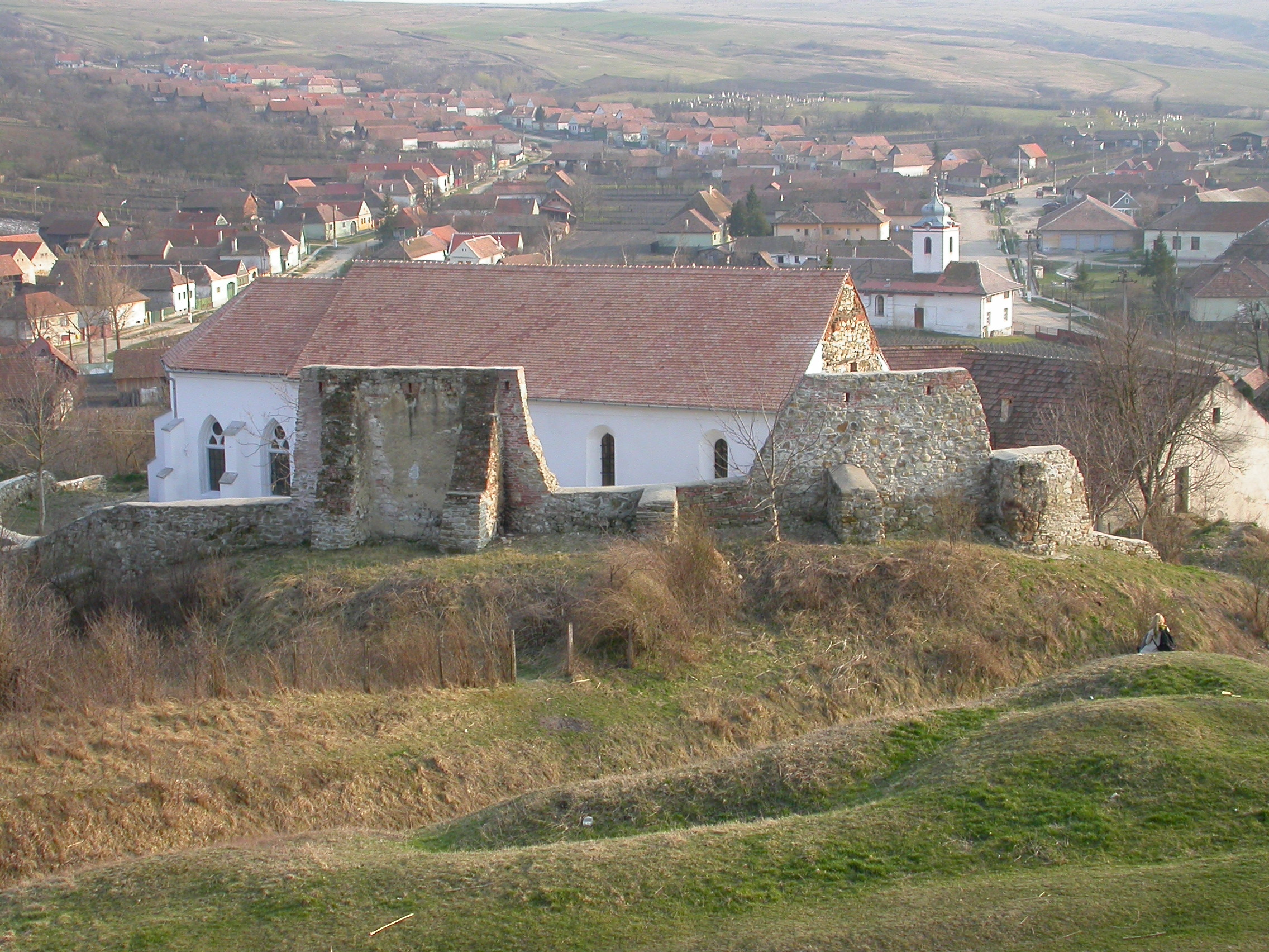 Ansamblul bisericii evanghelice fortificate, sec. XV - înc. sec. XX